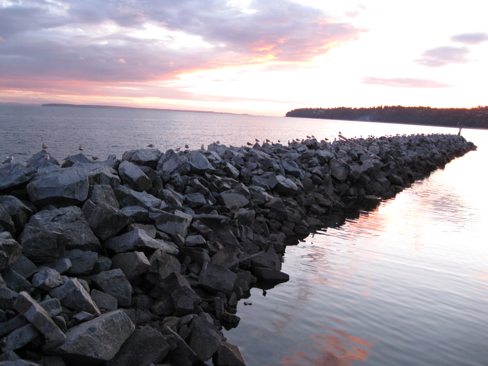 El rompeolas de White Rock